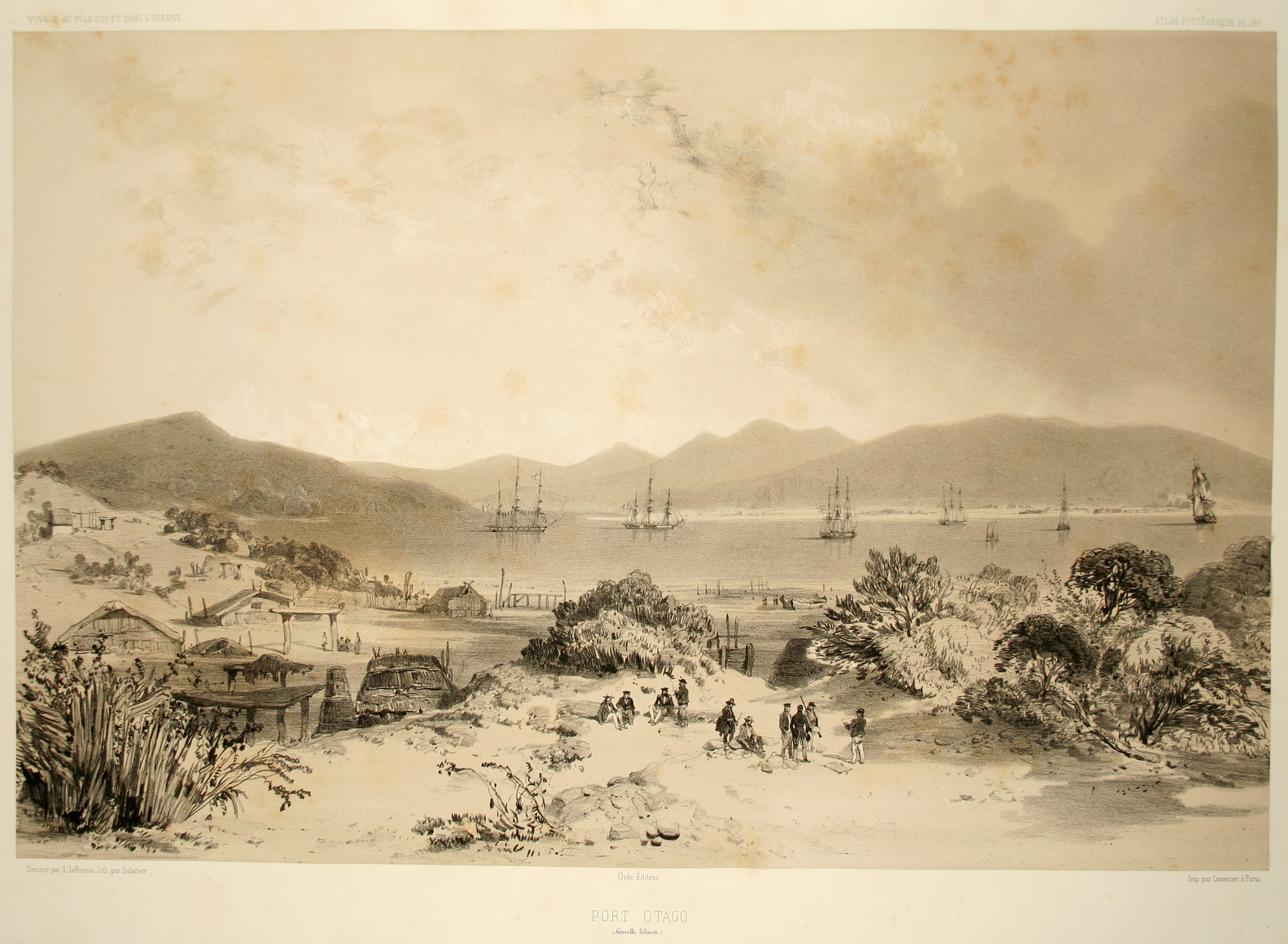 Port Otago. Atlas pittoresque, planche 180